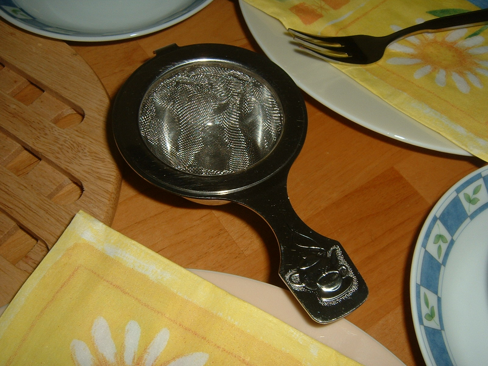 Teesieb. Das Objekt ist möglicherweise noch nicht gemeinfrei. Der Designer, der Hersteller und das Herstellungsjahr sind unbekannt.